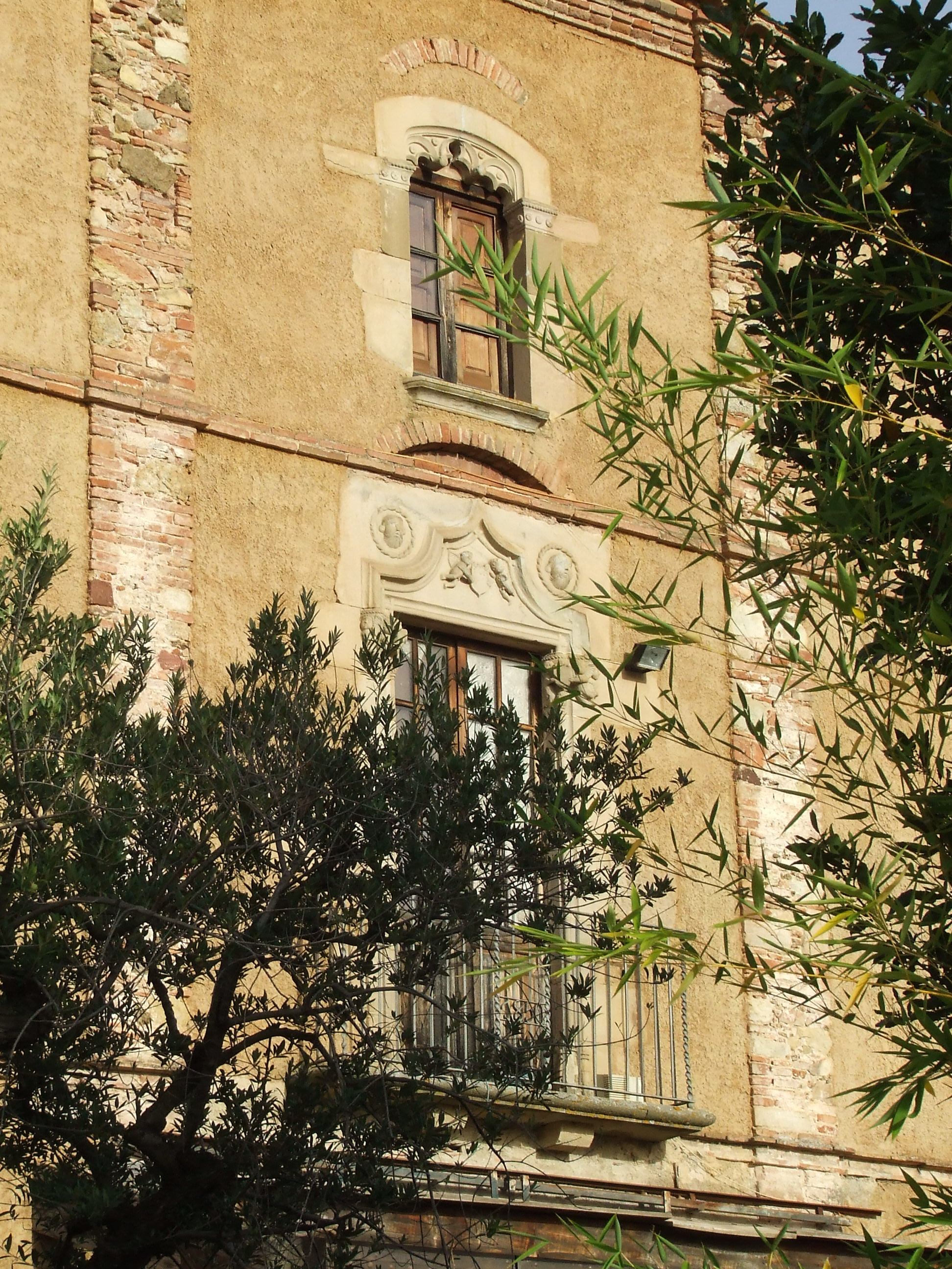 Can Regassol (Bigues, Bigues i Riells, Vallès Oriental)